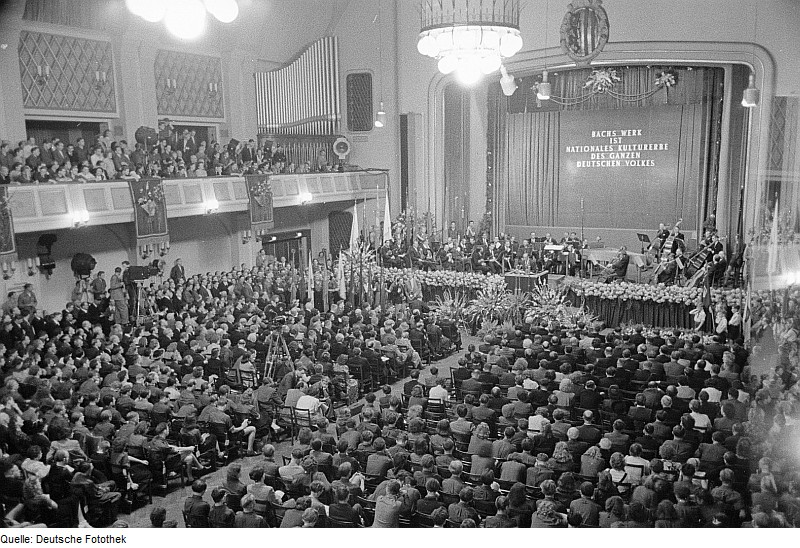 Original image description from the Deutsche Fotothek Podium und Publikum der Bachfeier